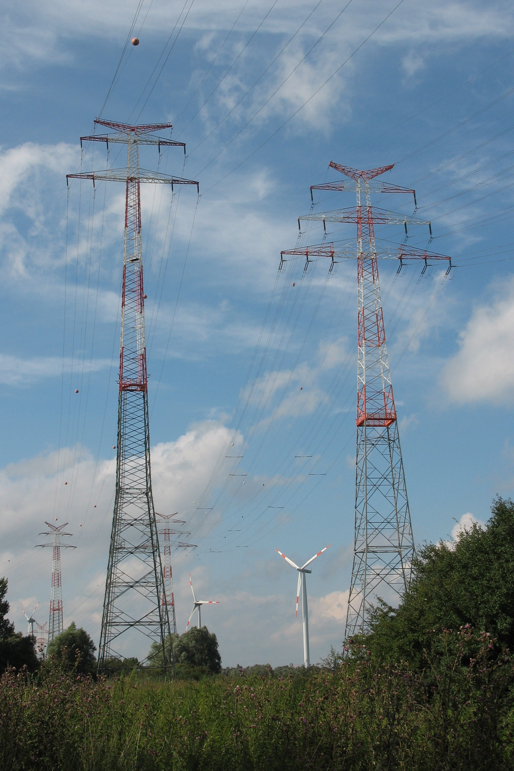 Weserquerungen Bremen-Industriehafen, von der linken Weserseite aus